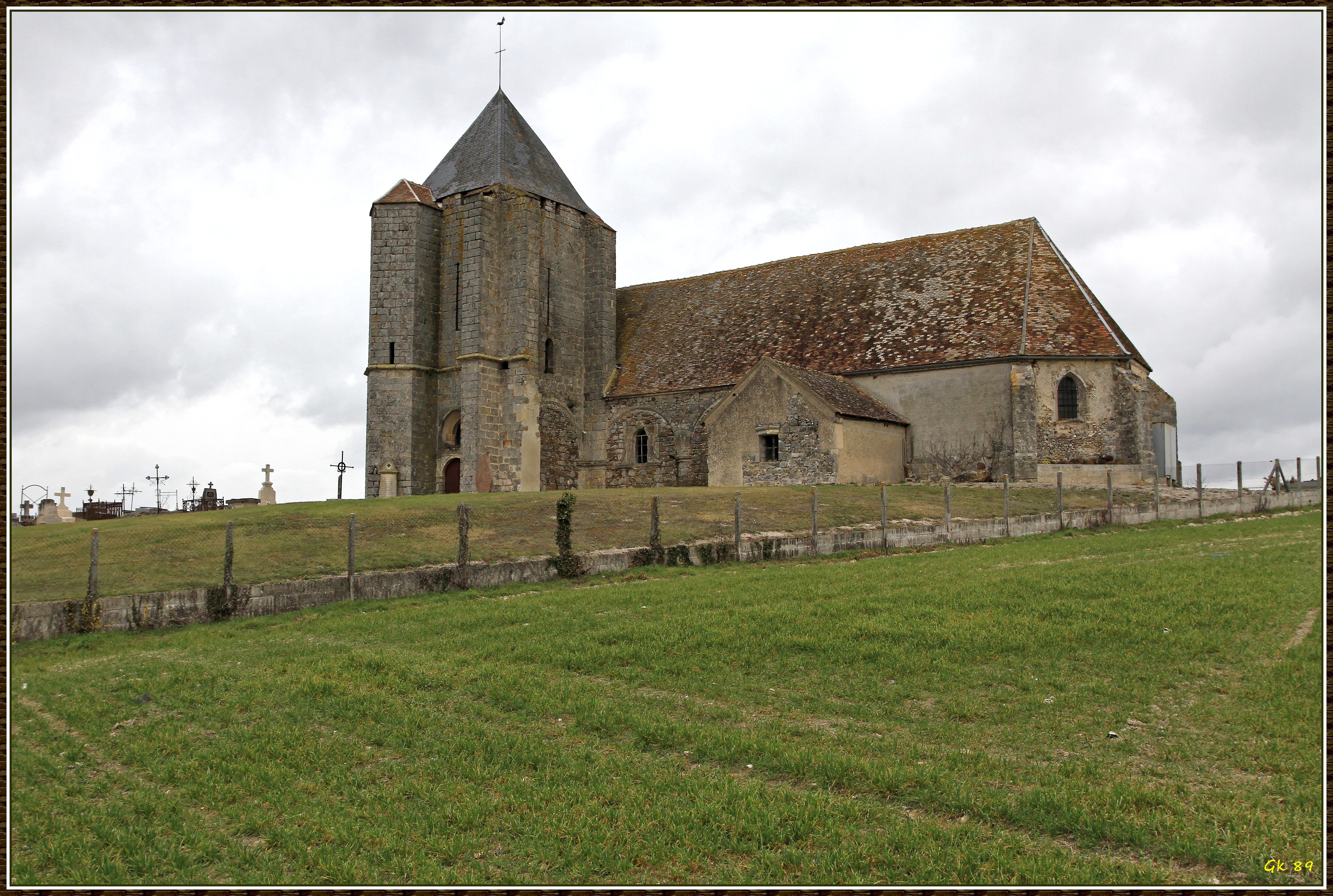 Église Saint-Léger de Compigny, (Inscrit, 2001) .